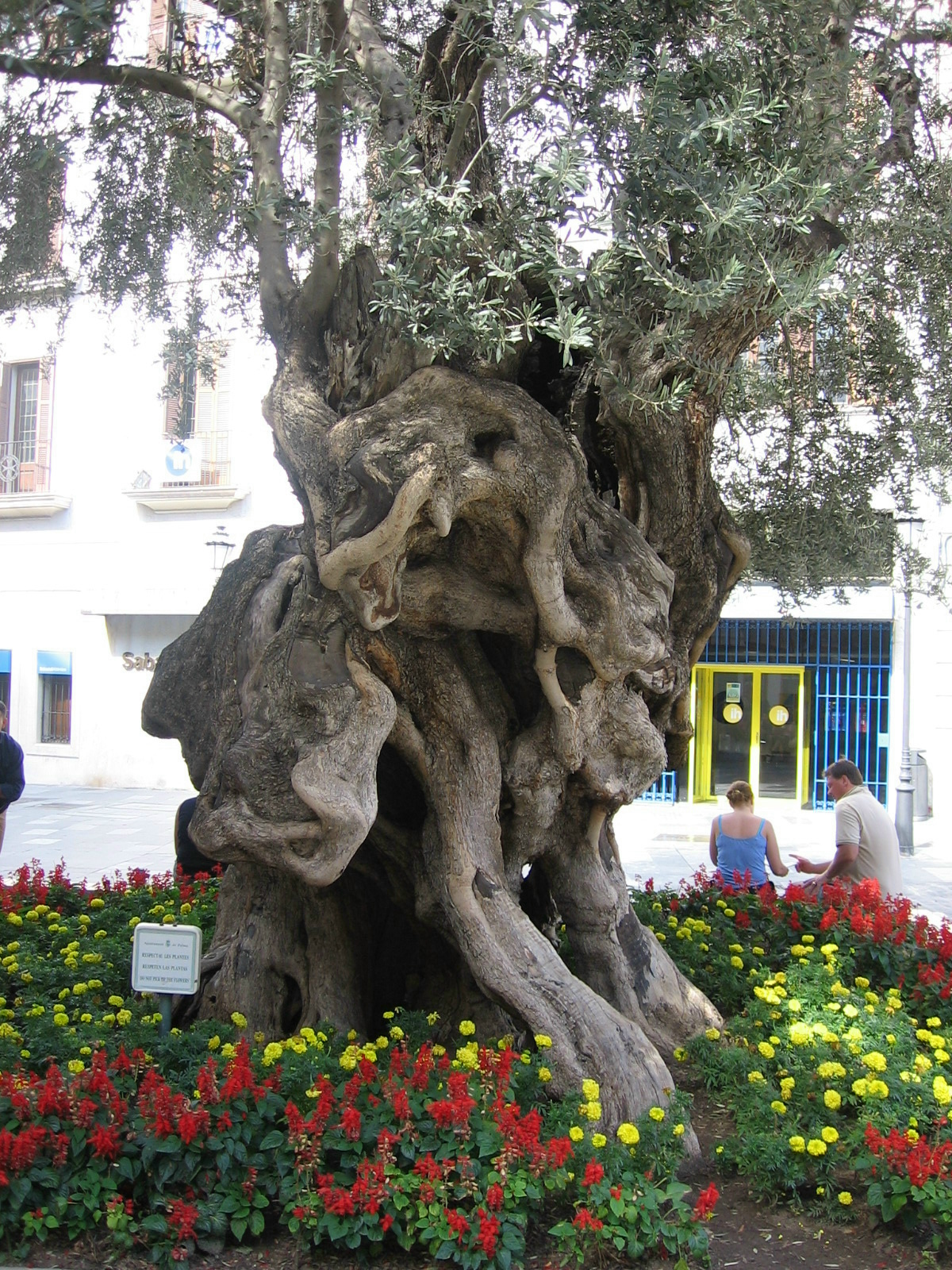 De dusendjahrige Öölboom in Palma de Mallorca.